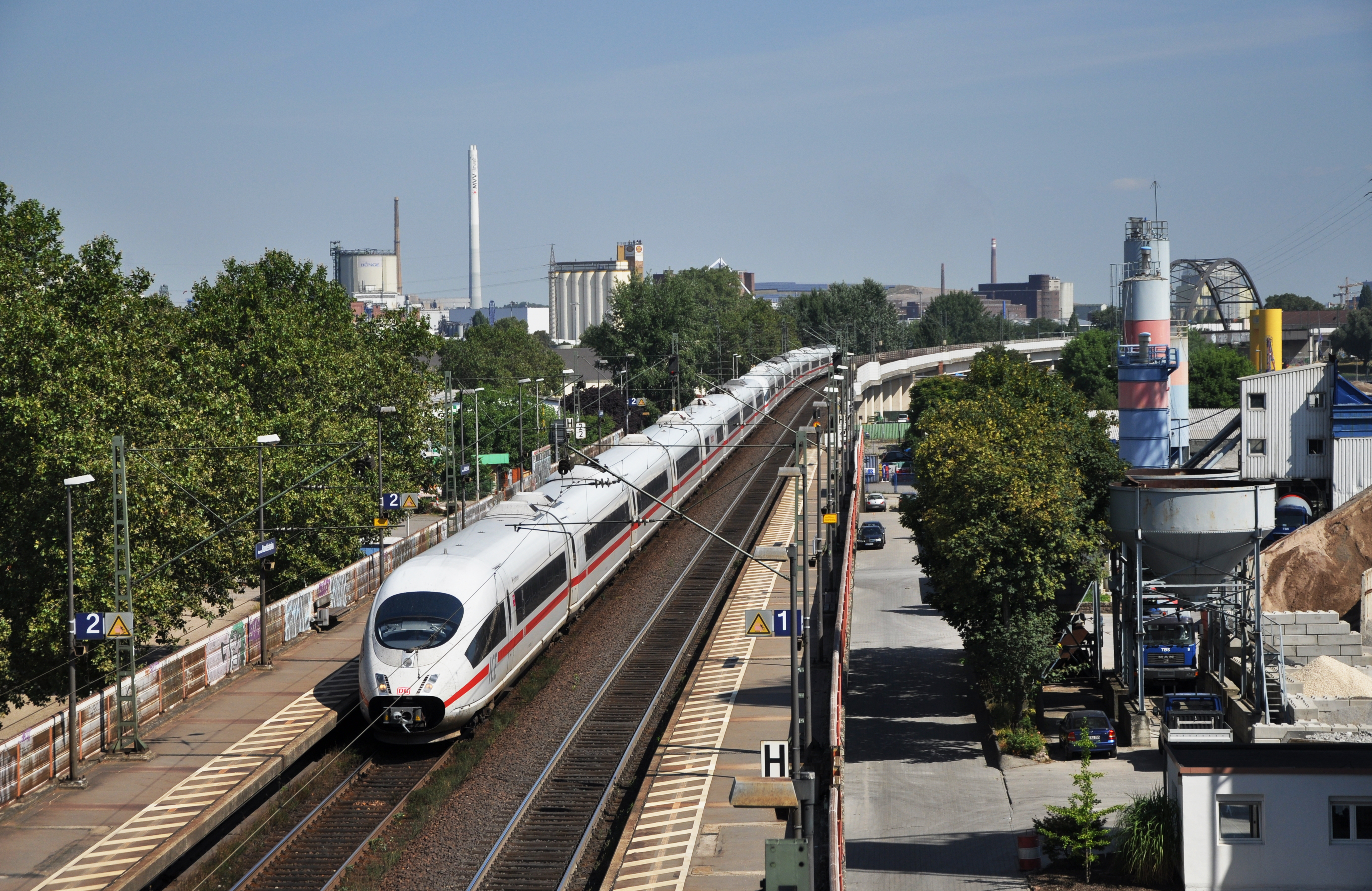 Blick von der Kurt-Schumacher-Brücke auf die Westliche Einführung der Riedbahn.